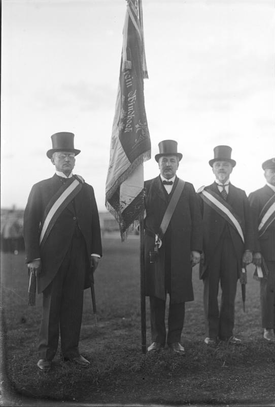 Die grosse Kundgebung 10 Jahre Versailles im Berliner Stadion! Über 50 tausend Menschen wohnten der Feier bei. Die Fahne Deutsch-Süd-West-Afrika, welche bei der Kundgebung 10 Jahre Versailles vorangetragen wurde.